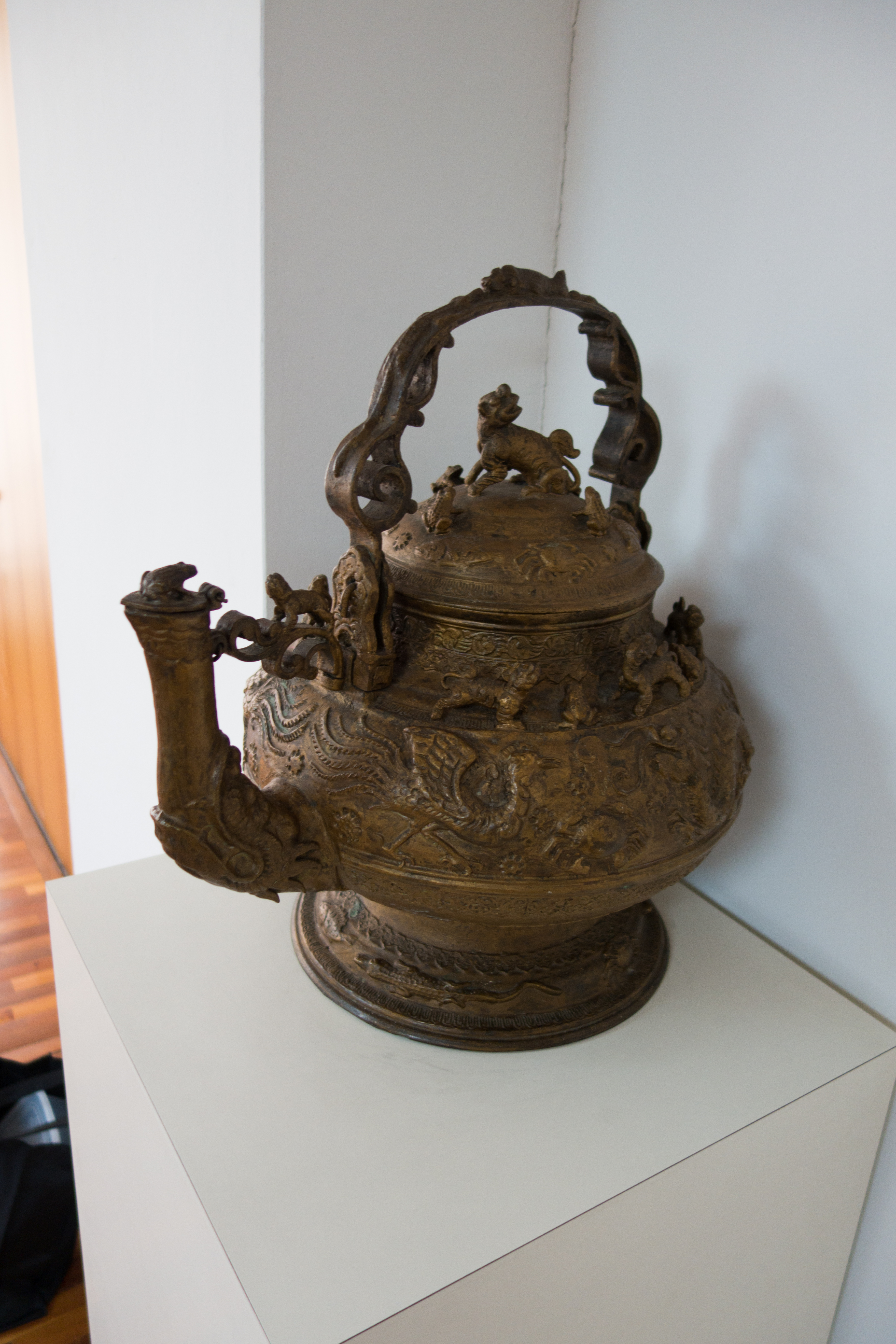 Kuching, Borneo, Malaysia